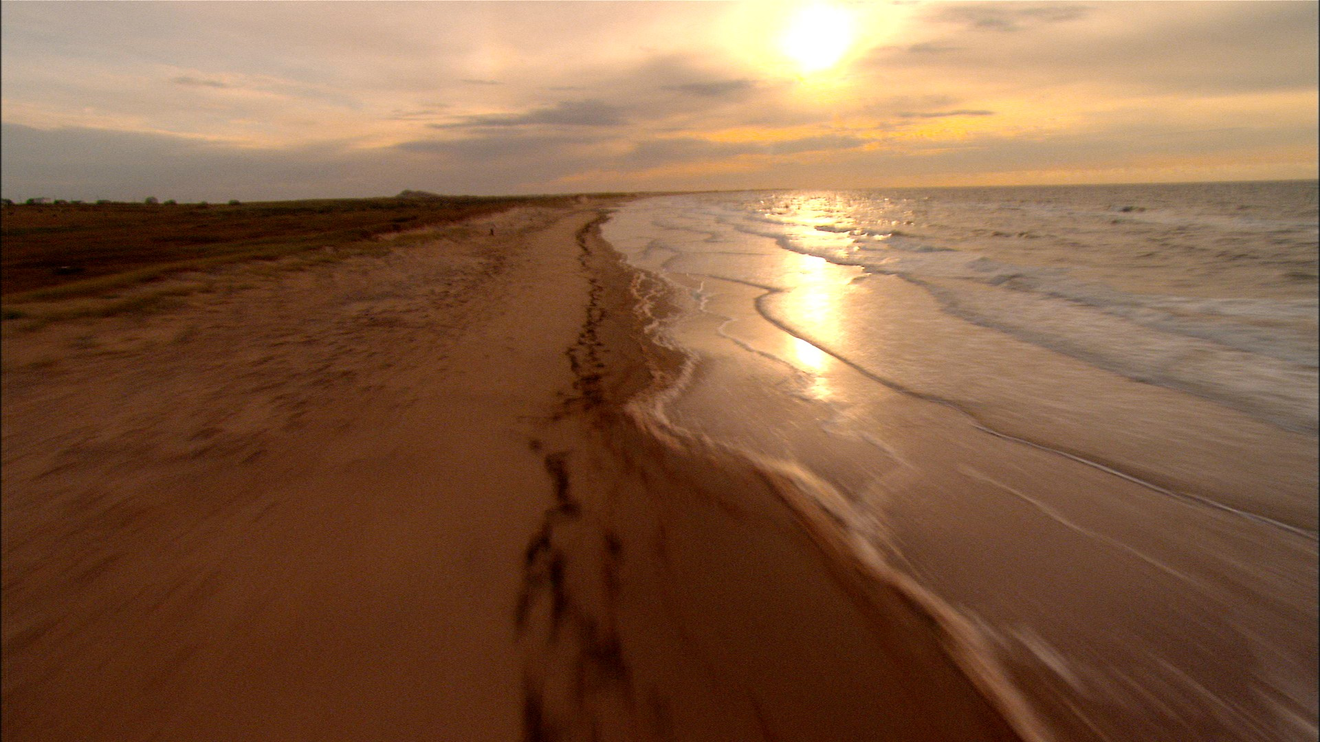 Paysage maritime des Îles-de-la-Madeleine / Maritime Landscape, Magdalan Island (Québec, Canada)